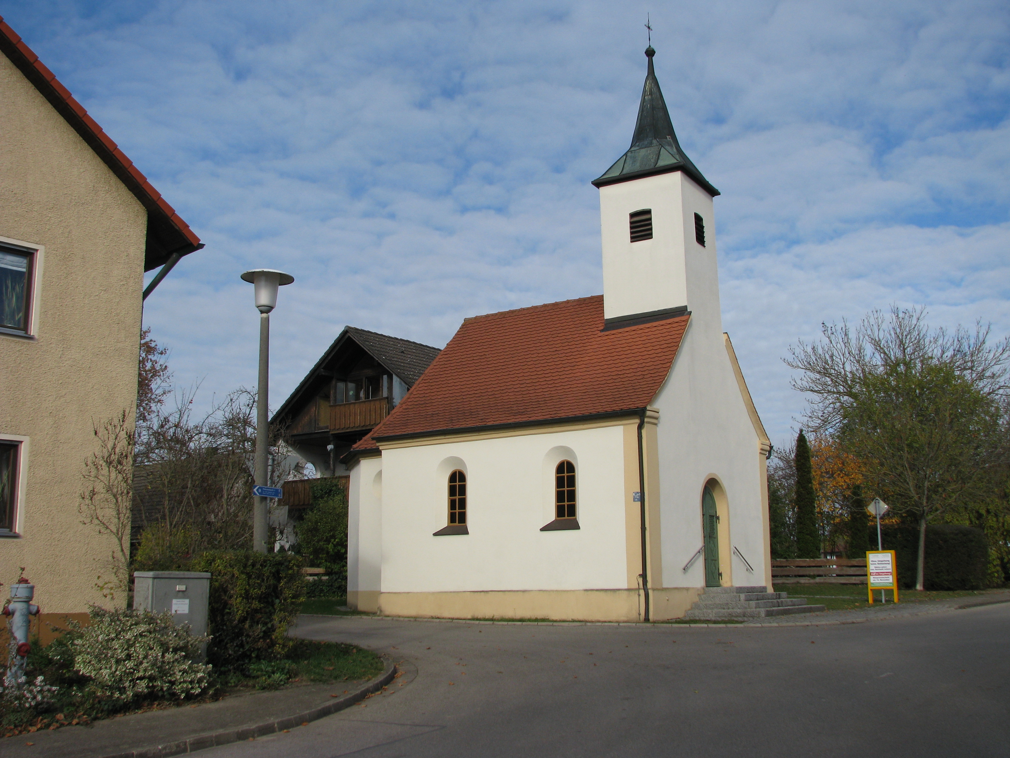 Lay, Ortsteil von Hilpoltstein im mittelfränkischen Landkreis Roth, Ortskapelle